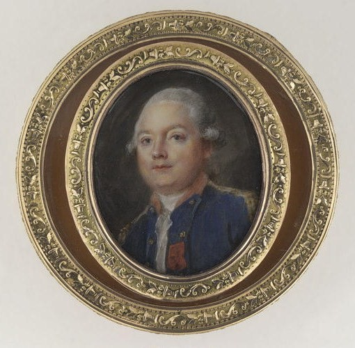 Portrait réalisé pendant la guerre d'Indépendance américaine, juste avant que Suffren n'accède à la gloire.